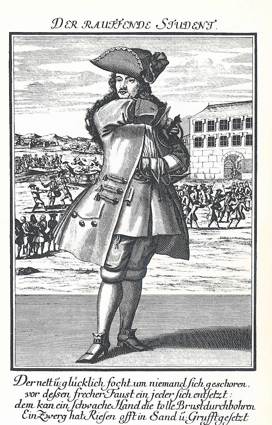 Johann Georg Puschner, "Der Rauffende Student", Kupferstich von 1725 Der rauffende Student Der nett und glücklich focht, um niemand sich geschoren, vor dessen frecher Faust ein jeder sich entsetzt: dem kan ein schwache Hand die tolle Brust durchbohren Ein Zwerg hat Riesen offt in Sand und Grufft gesetzt